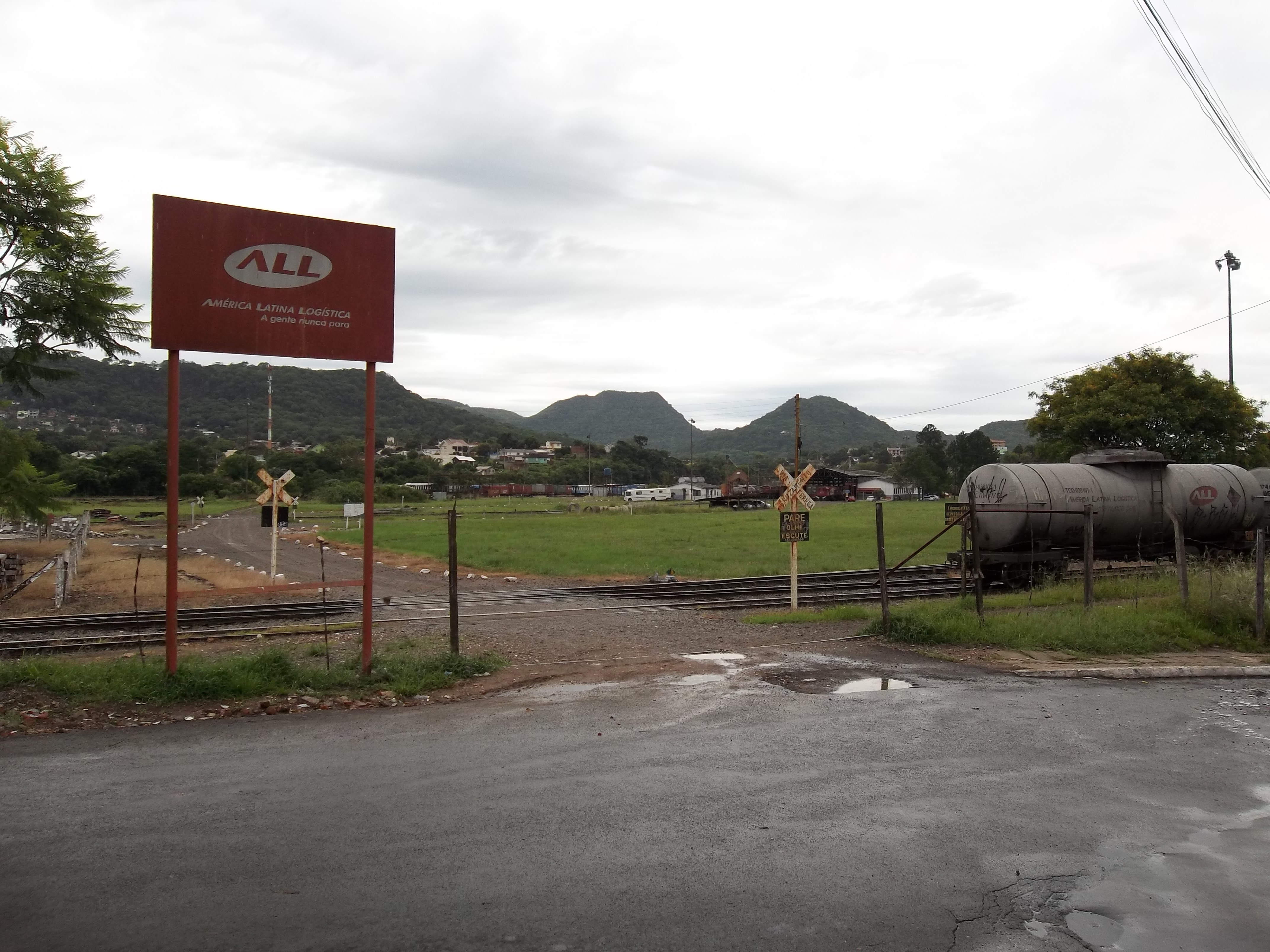 Parque de Triagem da América Latina Logística. Itararé, Sede, Santa Maria, Rio Grande do Sul, Brasil.